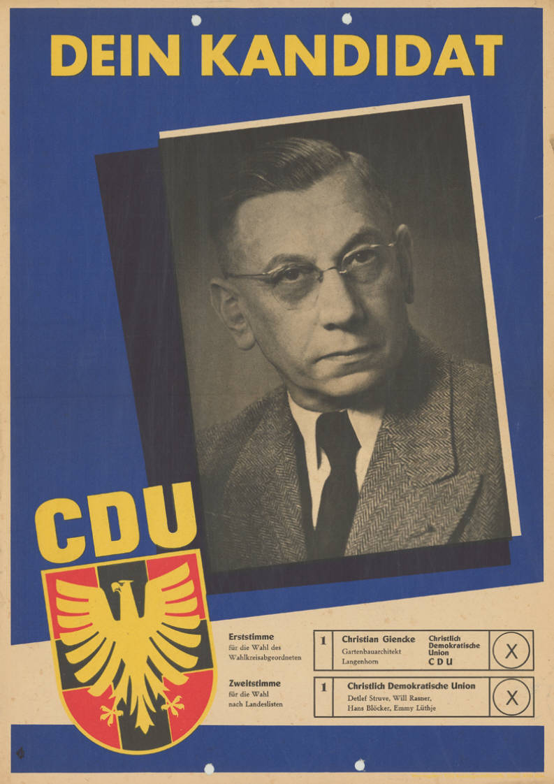 Dein Kandidat CDU Erststimme für die Wahl des Wahlkreisabgeordneten 1 Christian Giencke Gartenbauarchitekt ... Zweitstimme für die Wahl nach Landeslisten 1 Christlich Demokratische Union Detlef Struve, Will Rasner, Hans Blöcker, Emmy Lüthje Abbildung: Porträtfoto Plakatart: Kandidaten-/Personenplakat mit Porträt Auftraggeber: CDU-Bundesgeschäftsstelle, Bonn Drucker_Druckart_Druckort: KVD, Köln Objekt-Signatur: 10-001 : 888 Bestand: Plakate zu Bundestagswahlen (10-001) GliederungBestand10-18: Plakate zu Bundestagswahlen (10-001) » Die 3. Bundestagswahl am 15. September 1957 » CDU » Mit Porträtfoto Lizenz: KAS/ACDP 10-001 : 888 CC-BY-SA 3.0 DE